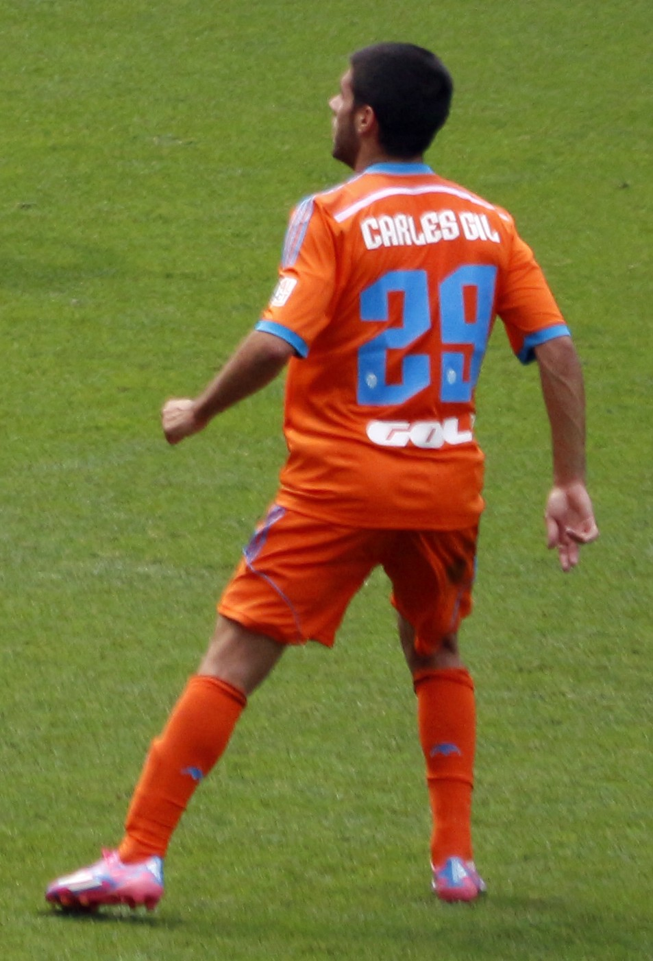 Emirates Cup, 3 d'agost de 2014.